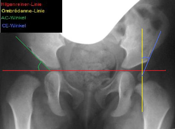 AC-Winkel und CE-Winkel am Röntgenbeispiel